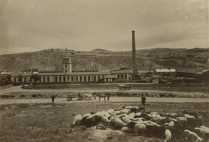 Безименно привилегировано дружество за кибрит в Костенец. Фотоалбум с фотографии на български индустриални предприятия от периода 1887-1912 г., подарен от Съюза на българските индустриалци на цар Фердинанд І по случай 25-годишнината от възшествието му на българския престол.